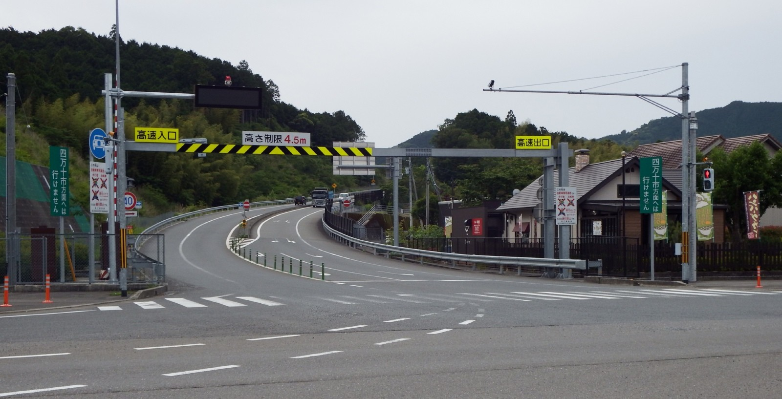 四万十町中央インターチェンジ